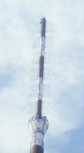 Andra masten vid Östersunds Radiostation med TV-antenner i toppen kort före rivning.